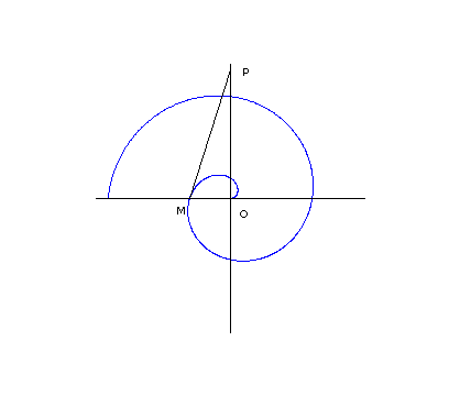 Spirale d'archimède et rectitude du cercle- Image personnelle